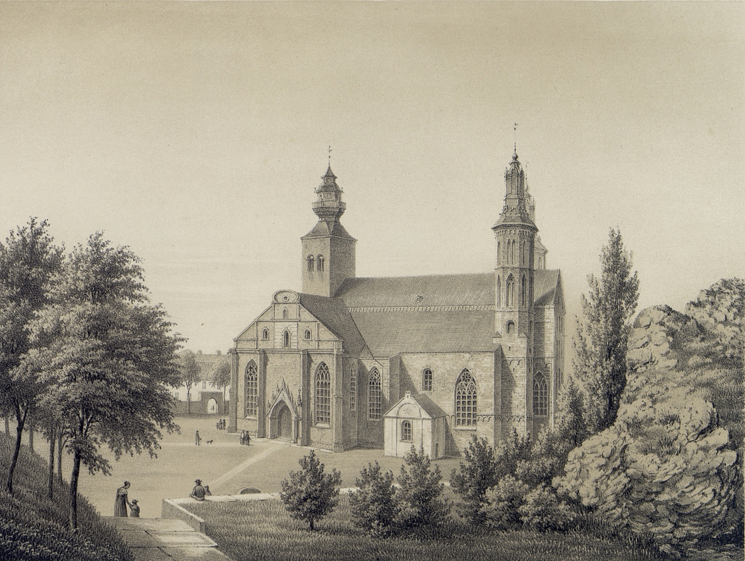 Litografi av Pehr Arvid Säve från boken och planschverket "Gotland och Wisby i taflor" från 1858